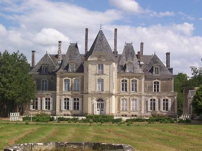 Façade ouest du château de Noirieux à Saint-Laurent-des-Mortiers (Mayenne, France).